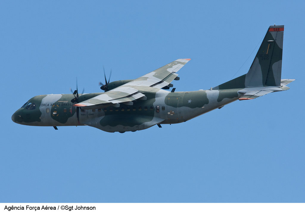 Aeronave Casa SC-105 Amazonas do 2º/10º Grupo de Aviação (Esquadrão Pelicano).